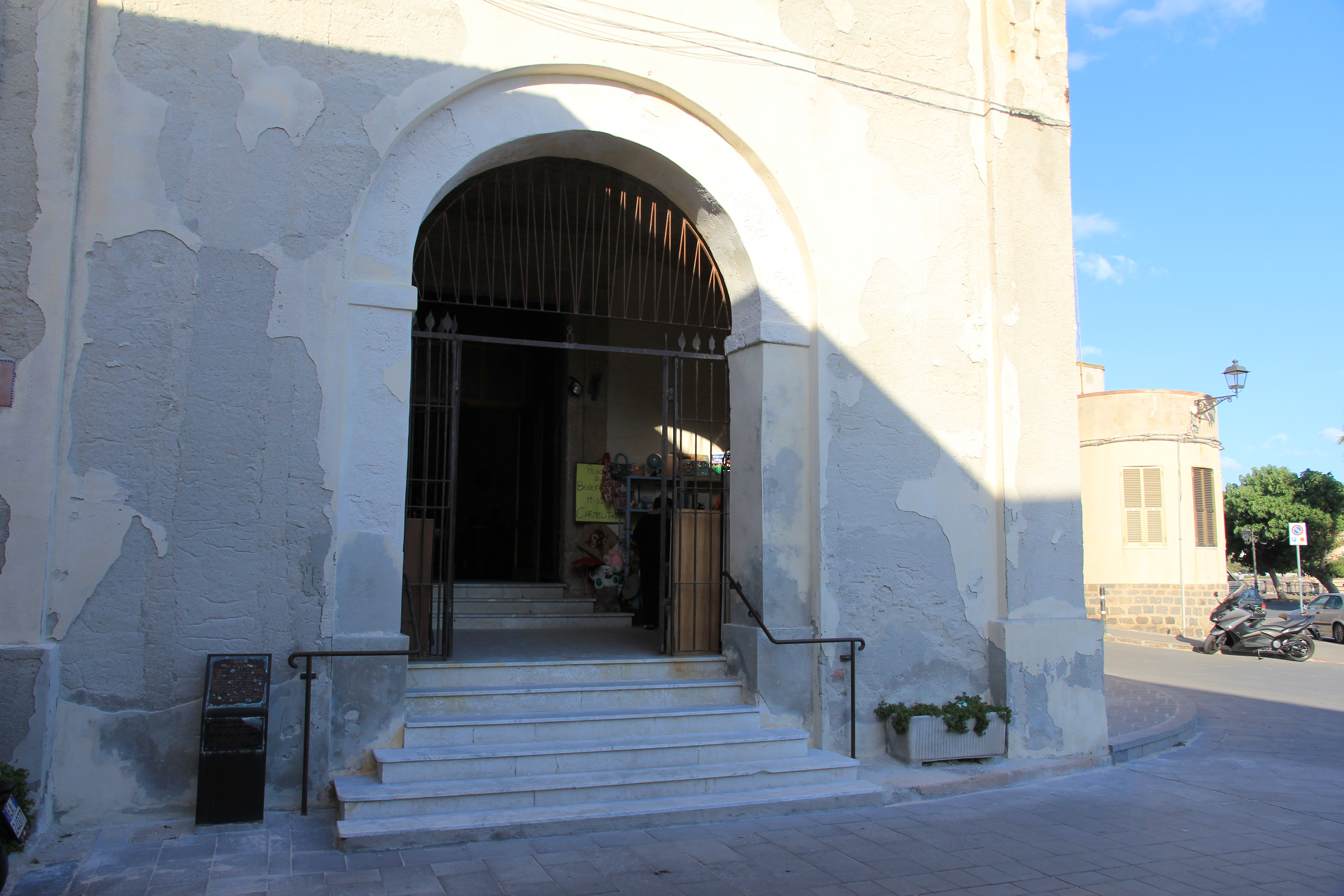 Alghero - Chiesa di Nostra Signora del Carmelo